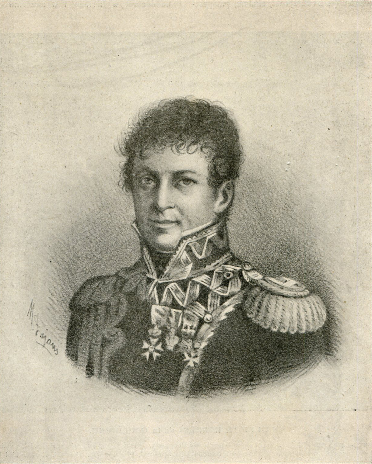 Беларуская (тарашкевіца): Партрэт Юзэфа Дамініка Касакоўскага (Juzef Daminik Kasakoŭski)